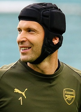 تمرین تیم فوتبال آرسنال پیش از فینال لیگ قهرمانان اروپا ۲۰۱۹